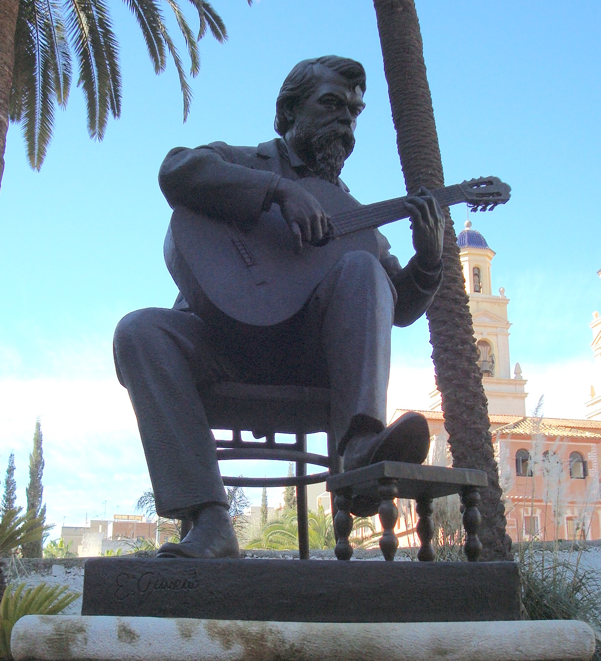 Monumento a Francisco Tárrega Eixea en el museo Casa de Polo de vila-real (Castellón)